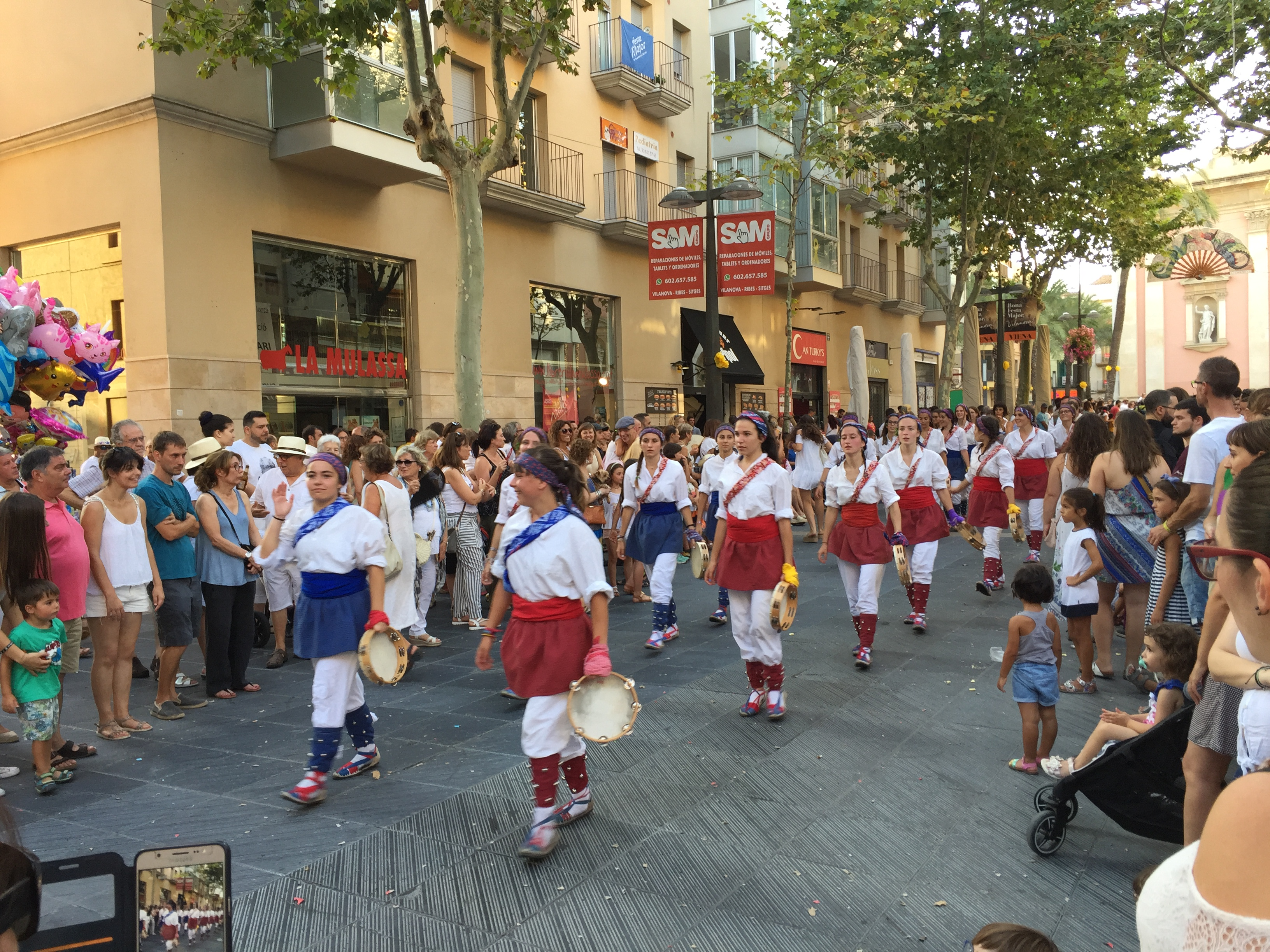 Ball de panderos a la Festa Major de Vilanova i la Geltrú 2019